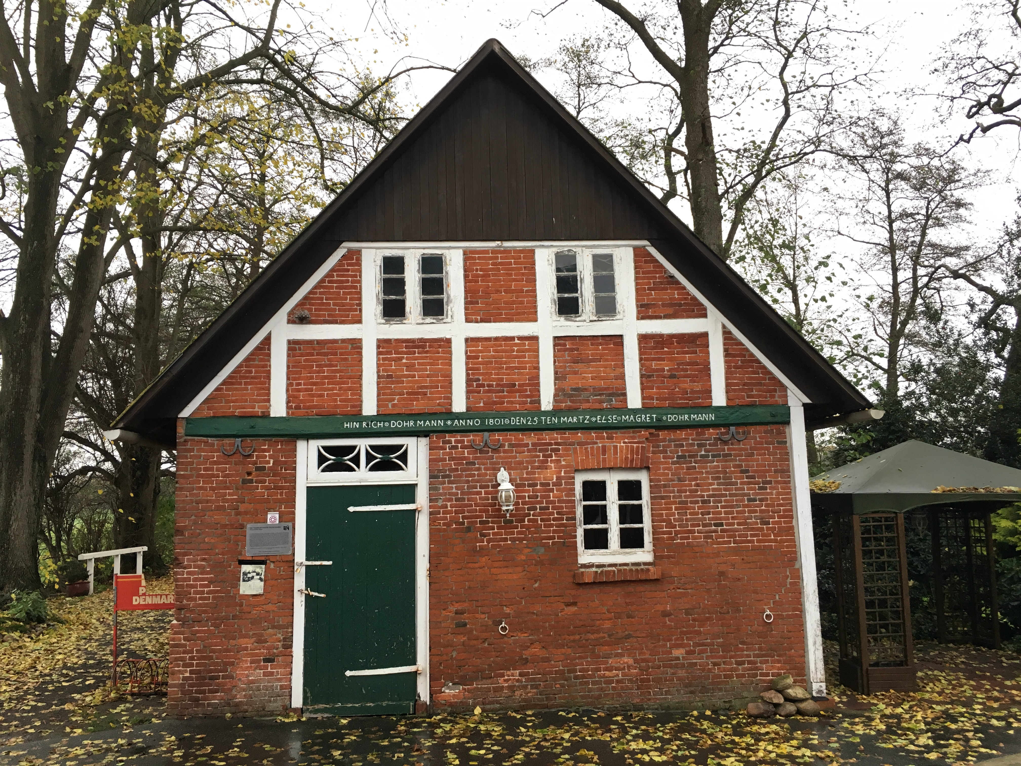 Hollener Möhl (von Oosten), Hollen, Landkreis Cuxhoben